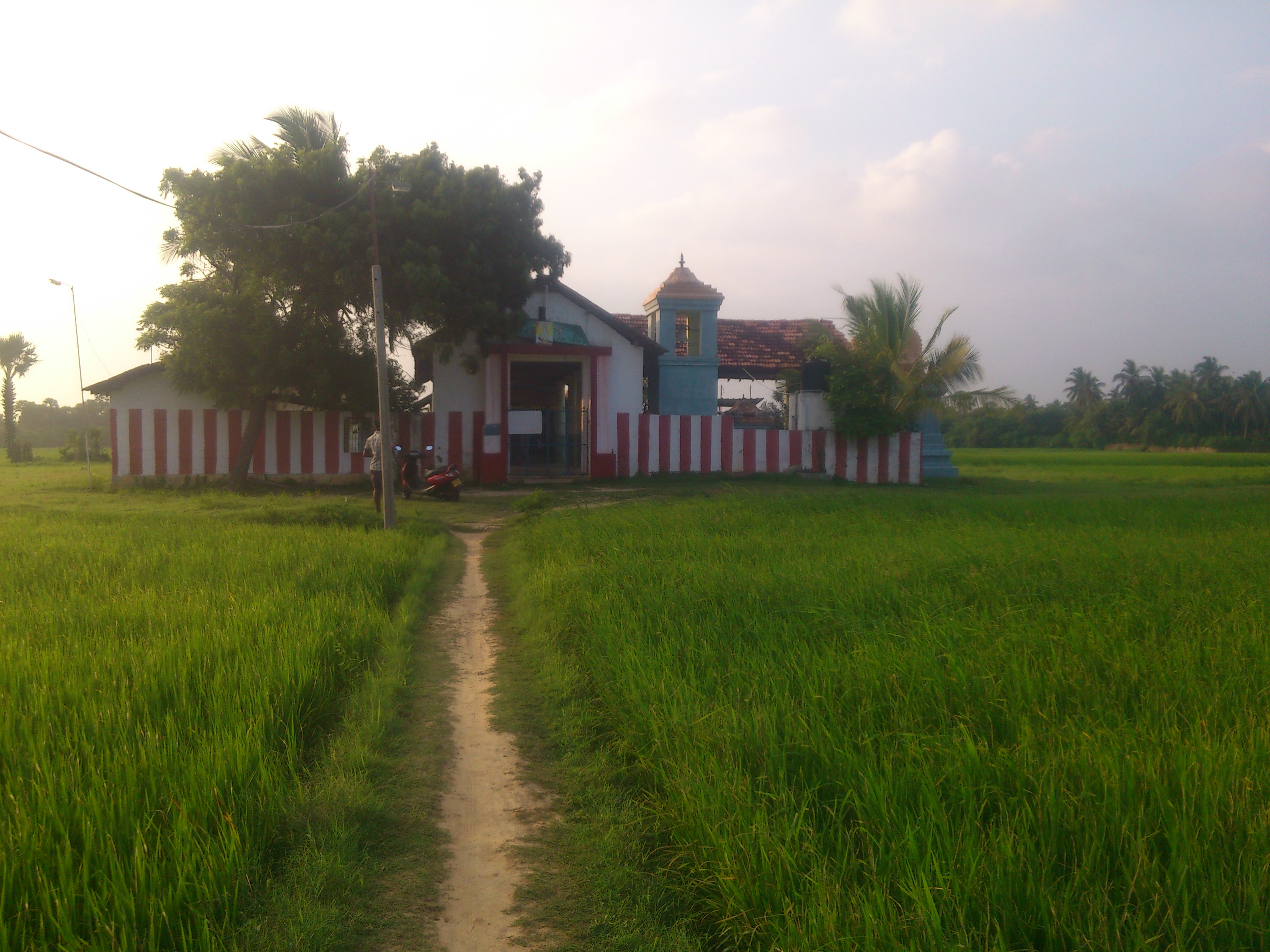 சித்திர வேலாயுதர்கோவில்